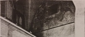 portál